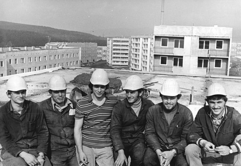 Baustelle Suhl-Nord, Brigade Schneider ADN-ZB Schaar 26.9.1980 Wettbewerb-Suhl: Schrittmacher im Wohnungsbau sind die Kollektive von der Baustelle Suhl Nord, hier Mitglieder der Brigade Schneider. Den auf dieser Wohnungsbaustelle arbeitenden Monteuren und Handwerkern des Ausbaus gelang es, den Arbeitszeitaufwand für eine Wohnung unter 300 Stunden zu senken. -siehe auch W0926-15N